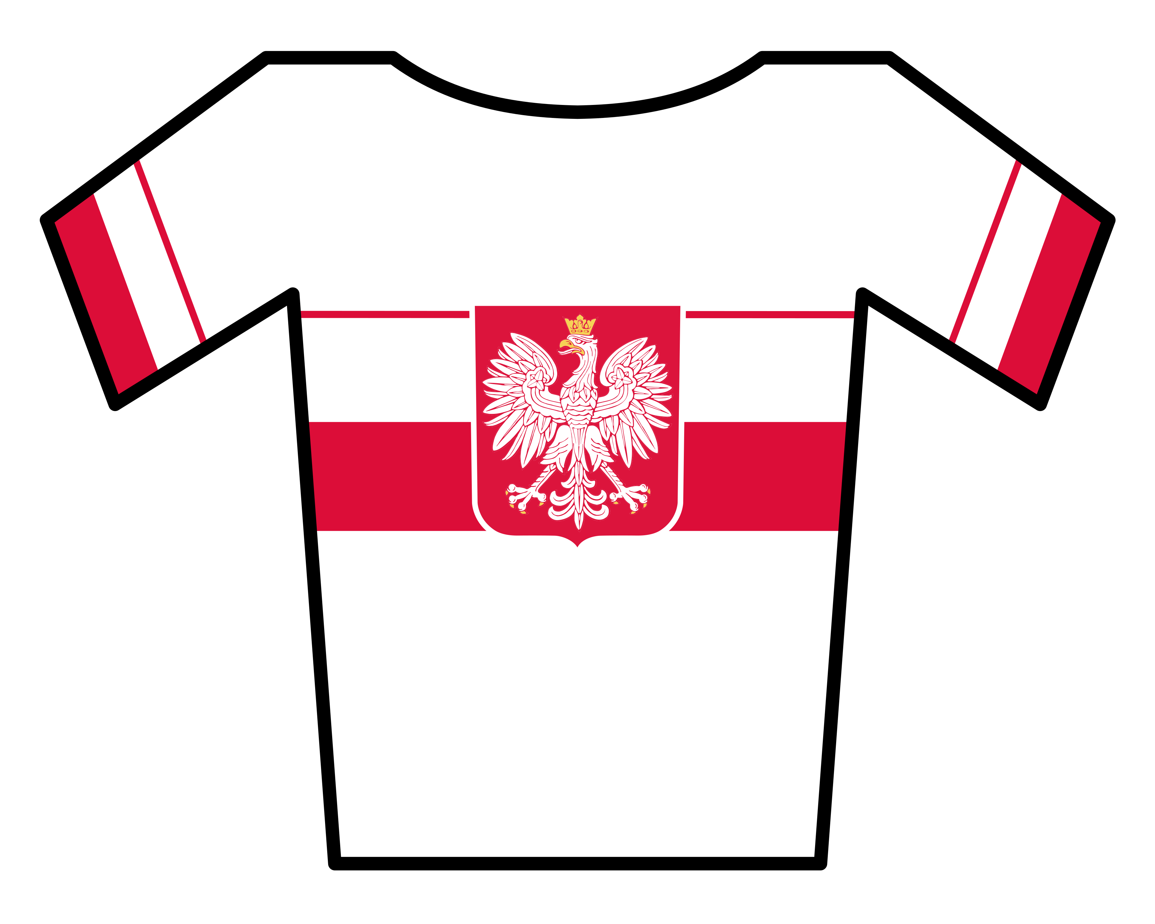 Maillot de Polonia